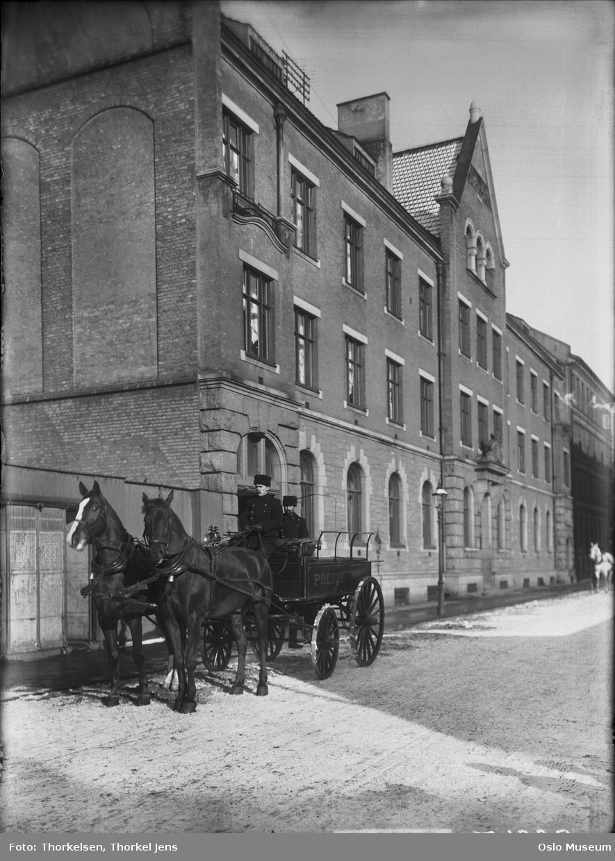 Grønland politistasjon ca. 1910